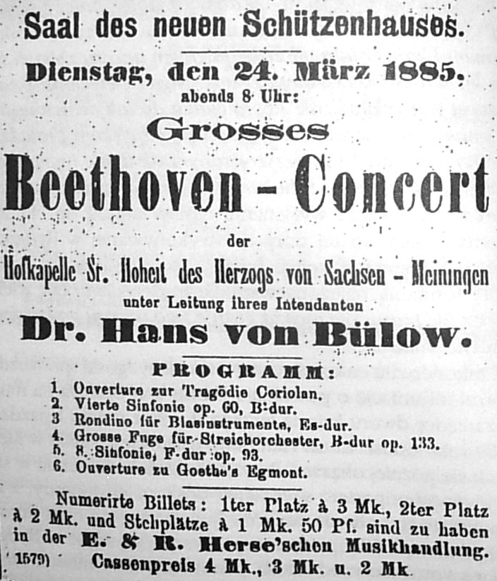 Anons o koncercie Hansa von Bullowa w Bydgoszczy -Ostdeutsche Presse 15-03-1885